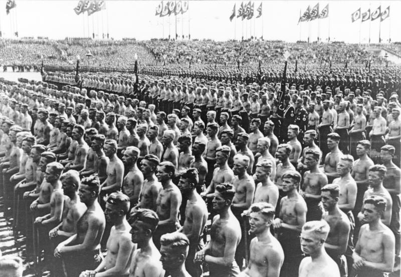 Reichsparteitag der NSdAP 1937; Der Ehrentag des Reichsarbeitsdienstes. Die Kolonnen des Reichsarbeitsdienstes, Symbol der deutschen Arbeit, während des Appells vor dem Führer auf der Zeppelinwiese. Mit entblösstem Oberkörper: die Angehörigen der Feldmeister- und Truppenführerschulen des Reichsarbeitsdienstes.